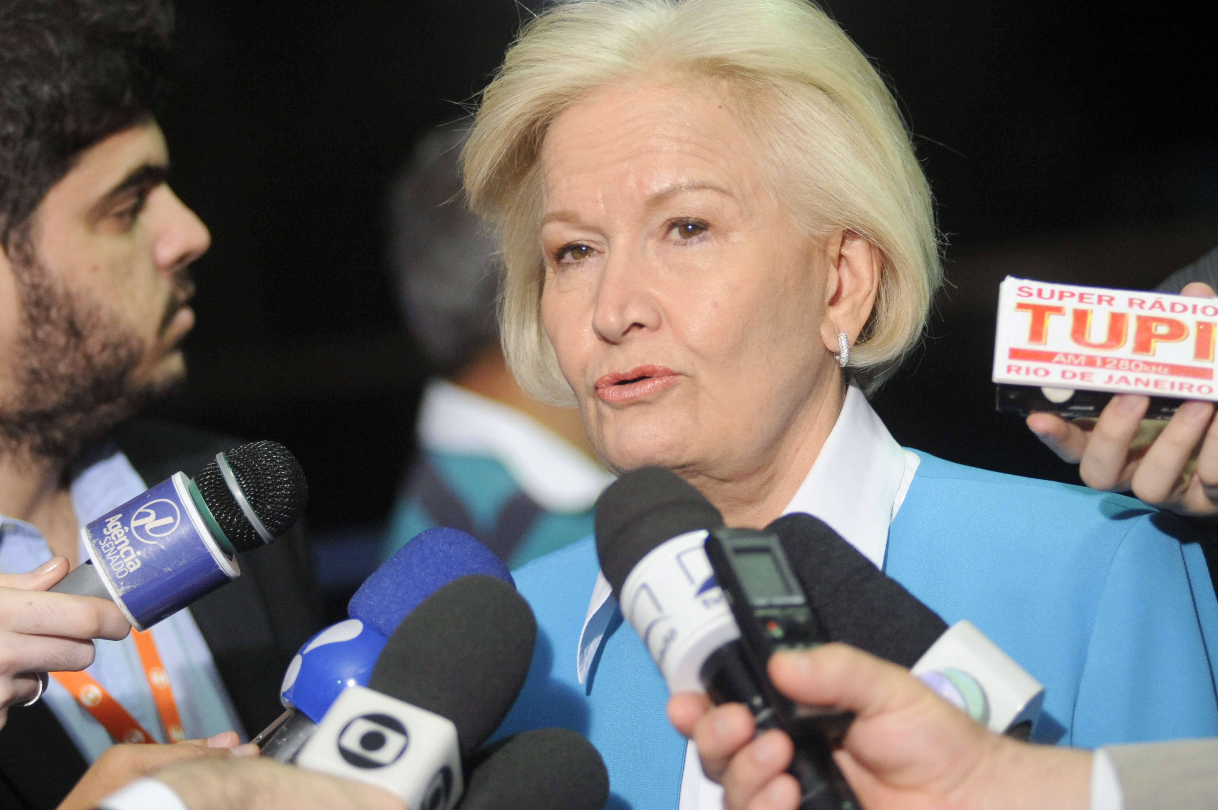 Senadora Ana Amélia (PP-RS) concede entrevista. Foto: Pedro França/Agência Senado